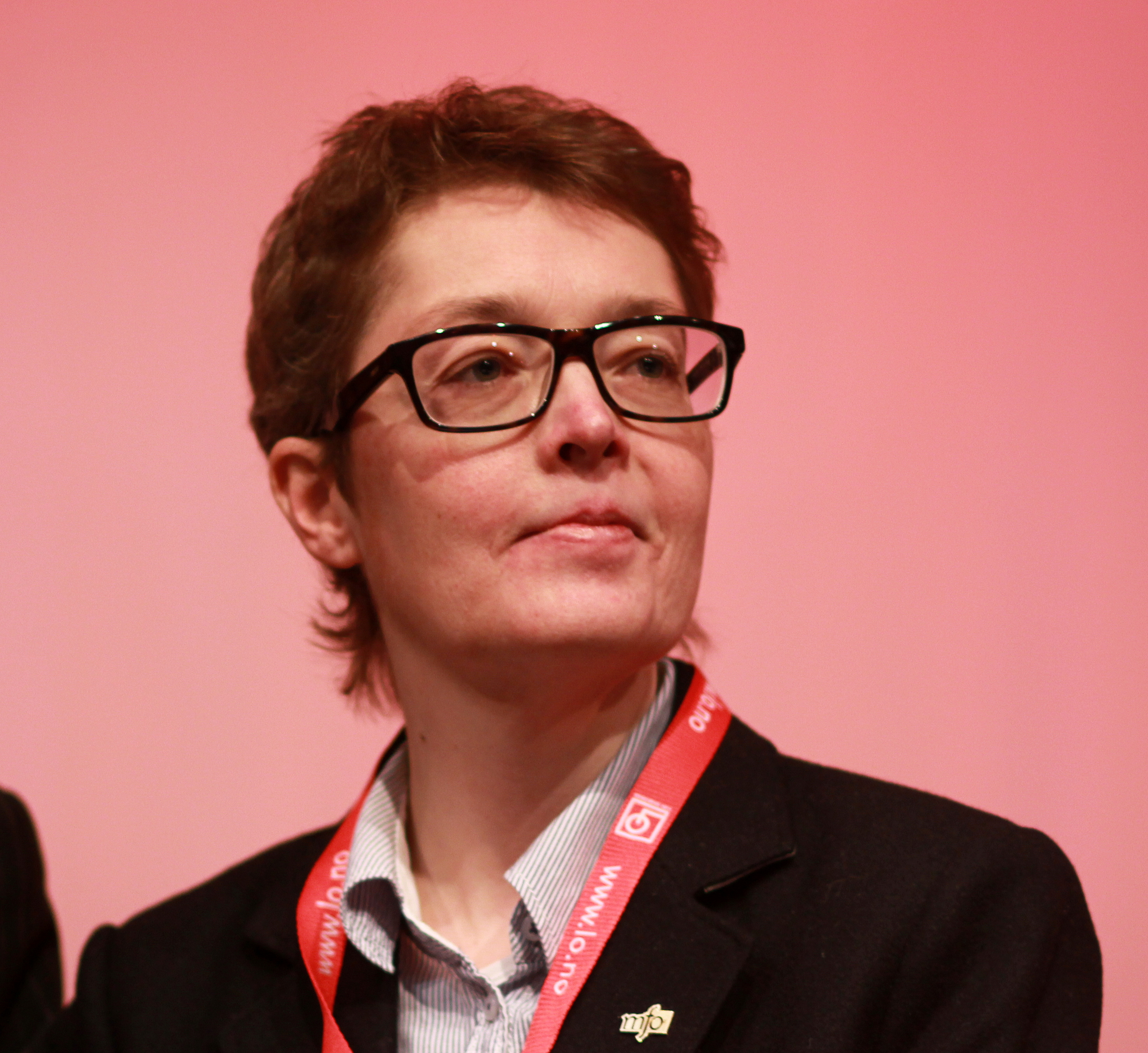 Renée Rasmussen, fagforeningsleder